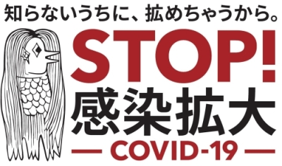 厚生労働省『STOP! 感染拡大――COVID-19』2020年。